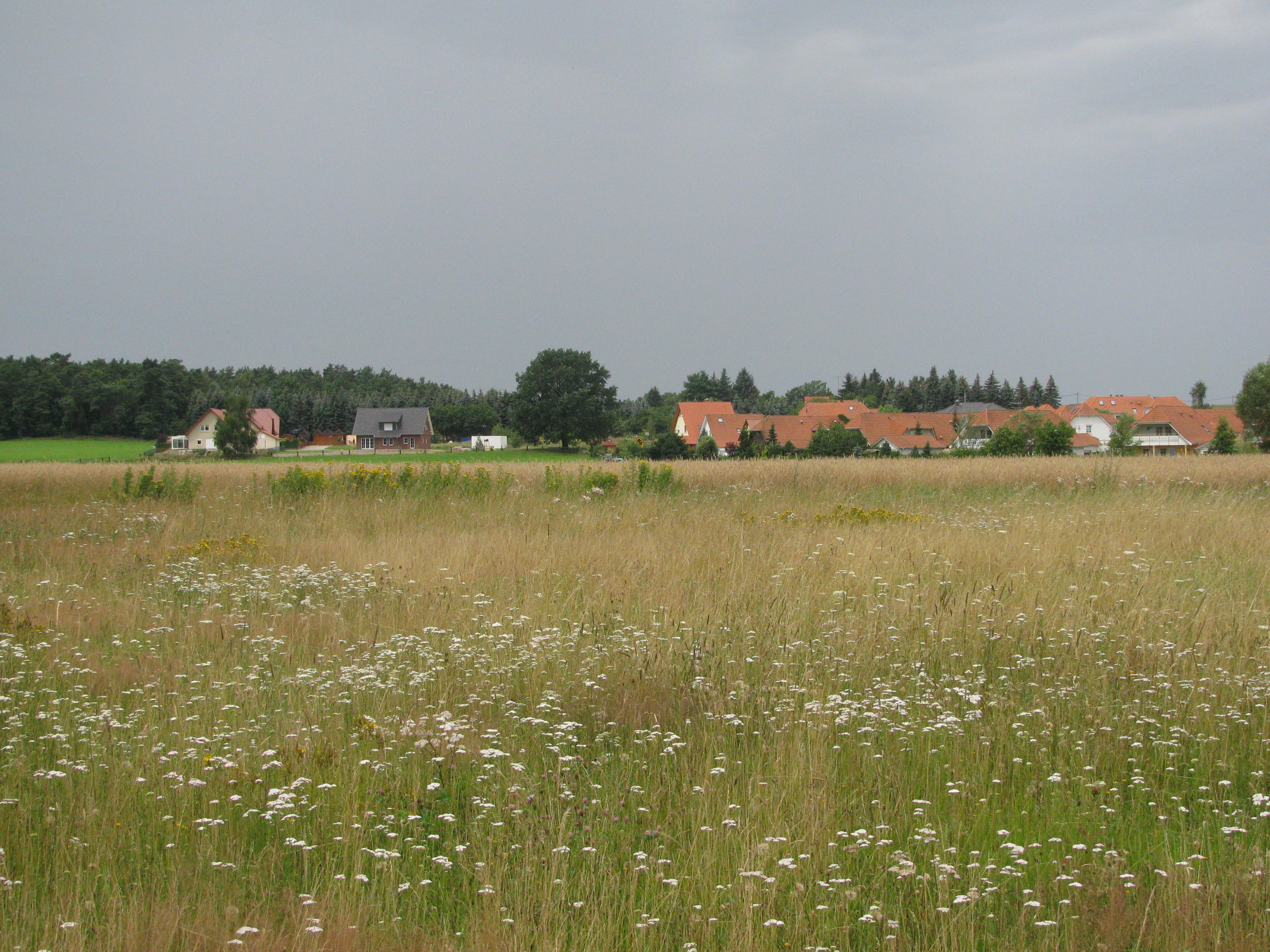 Schwedensiedlung mit der Eiche in Steinbach, Gemeinde Moritzburg, Sachsen